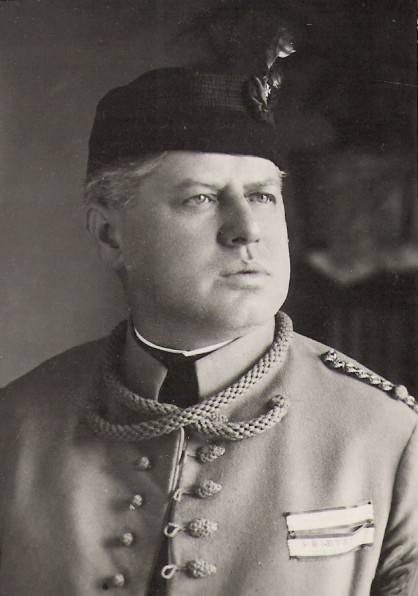 Ing. Adolf Švec